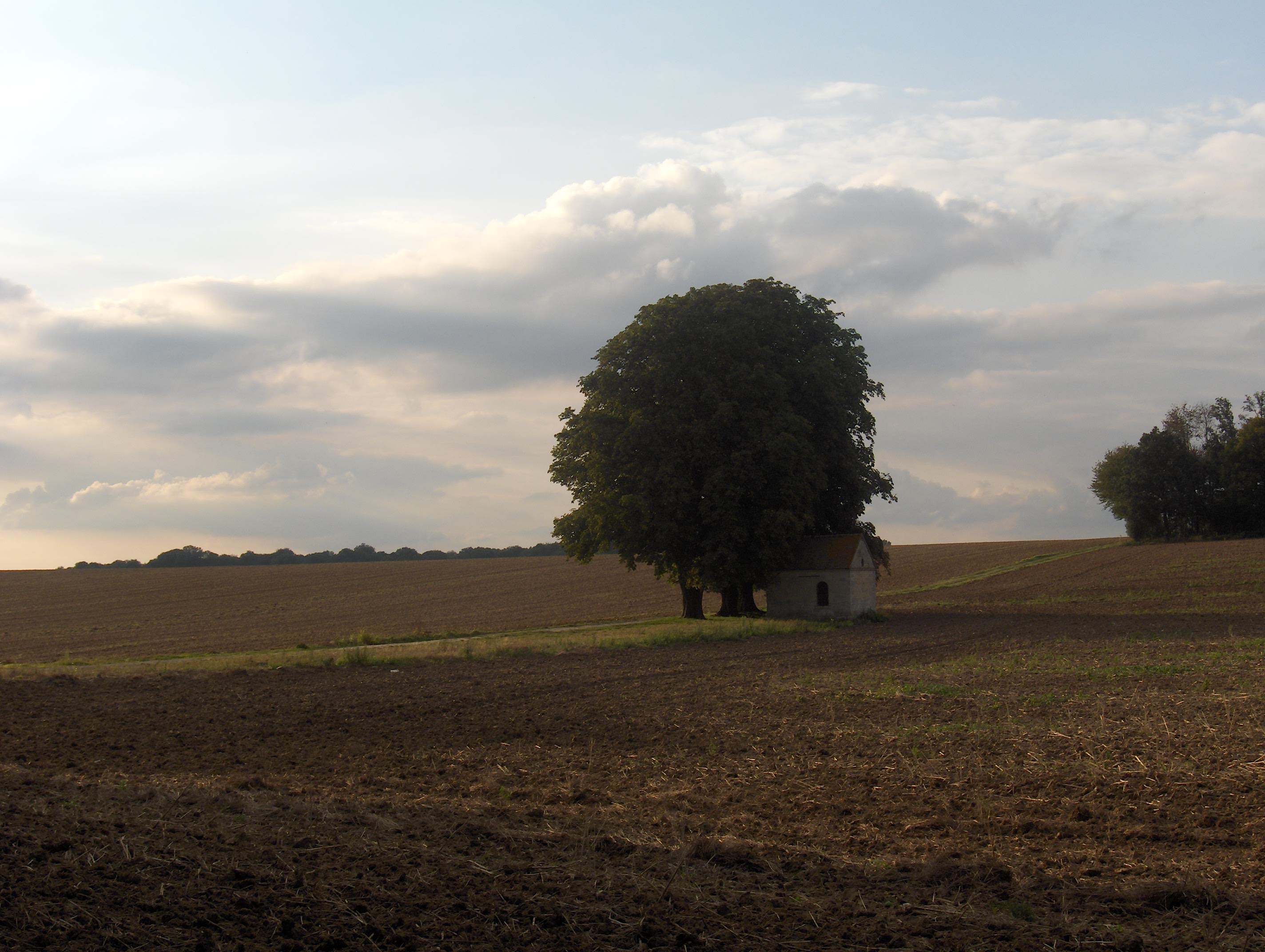 Chapelle Saint-Robert à Hédouville (Val-d'Oise)